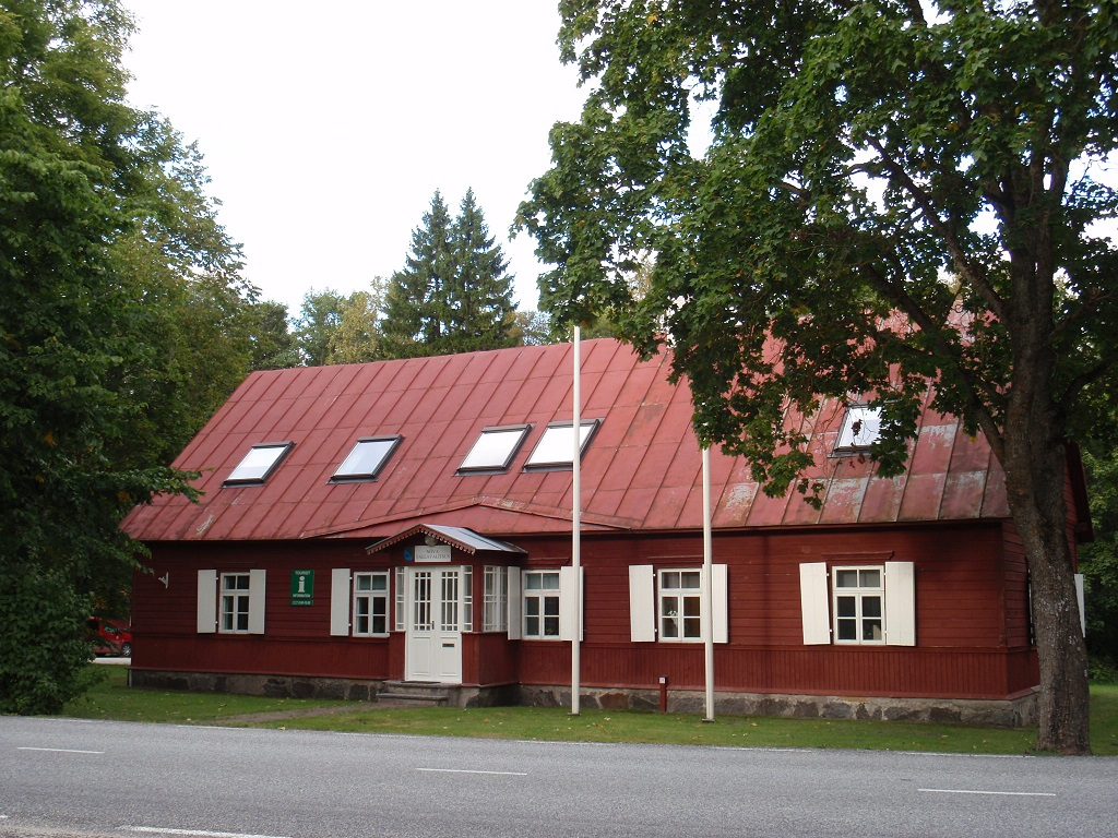 Nõva vallamaja